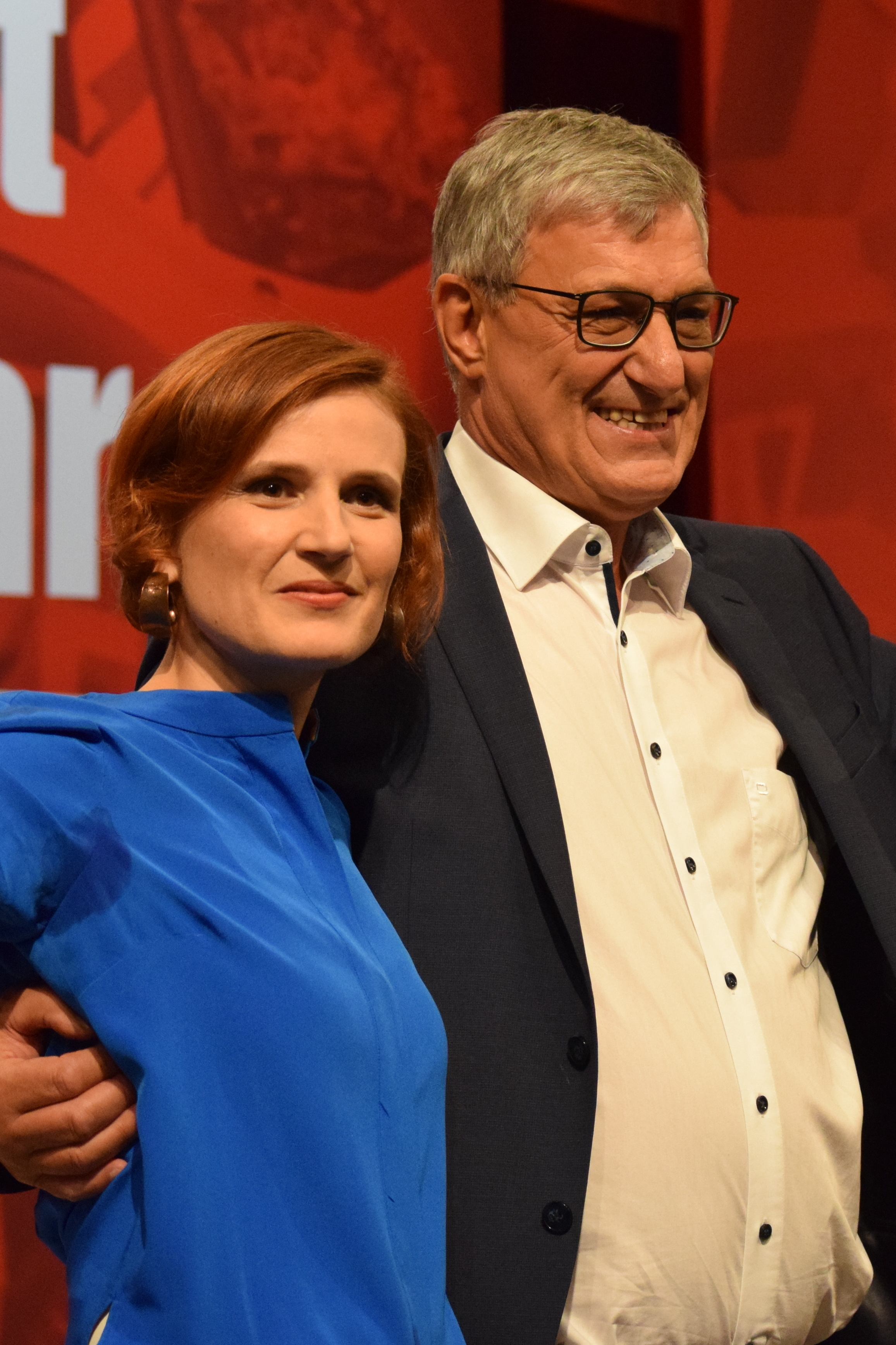 Die Parteivorsitzenden der Linkspartei Katja Kipping und Bernd Rizinger. Leipziger Parteitag der Linkspartei 2018. 1. Tagung des 6. Parteitages der Partei DIE LINKE. Vom 8. bis 10. Juni 2018. Tagungsort: Leipziger Messe, Congress Center Leipzig.